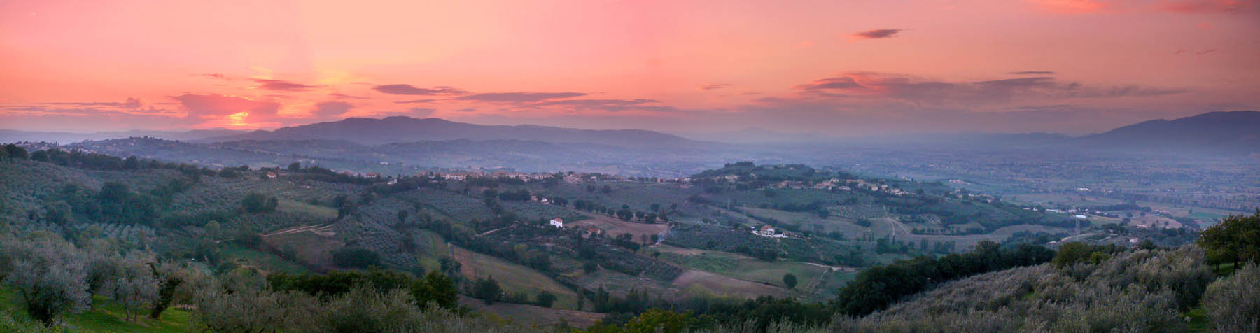 Montefalco, panoramic view